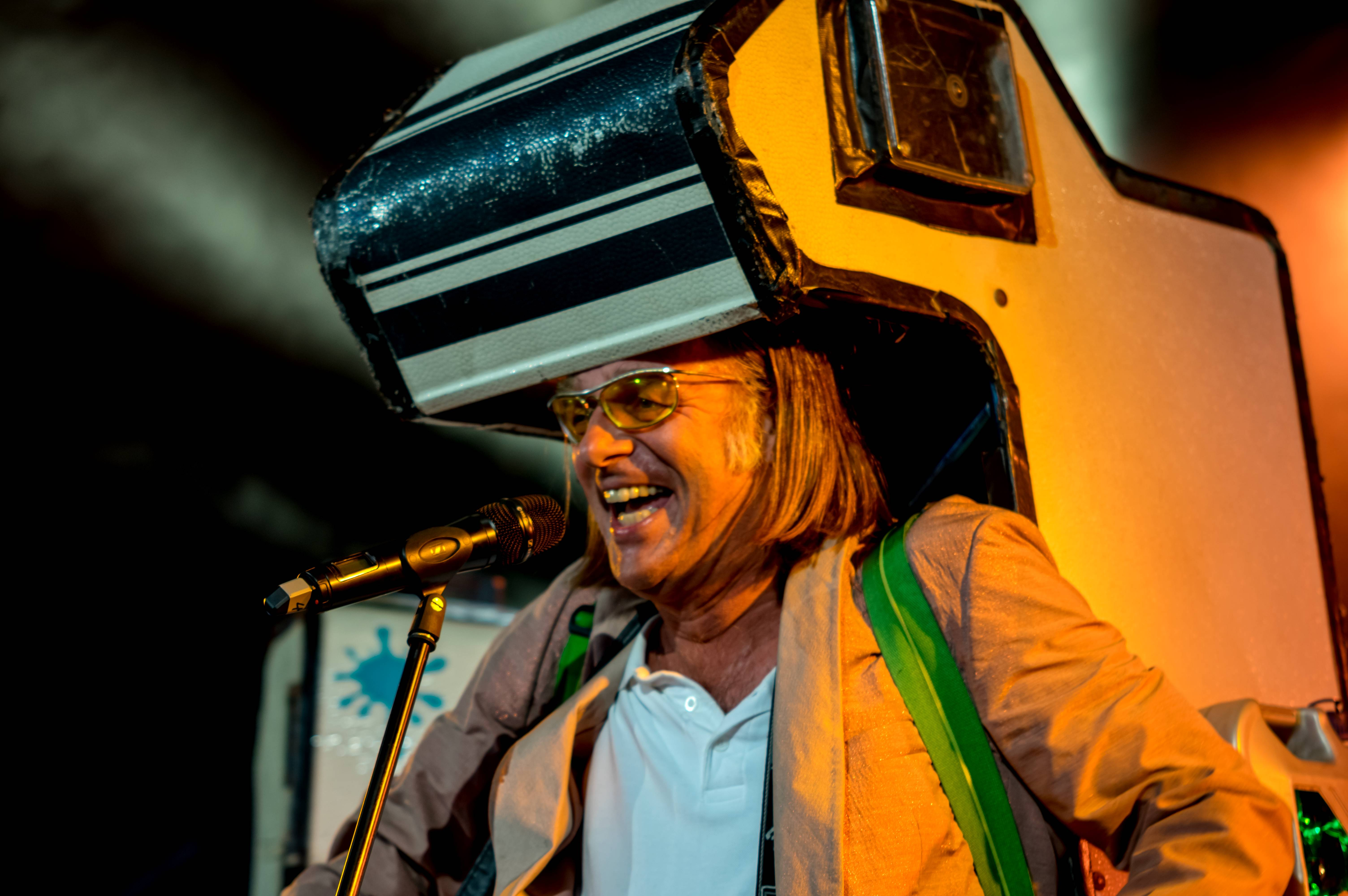 Bilder vom ZMF 2015 Die kleine Tierschau